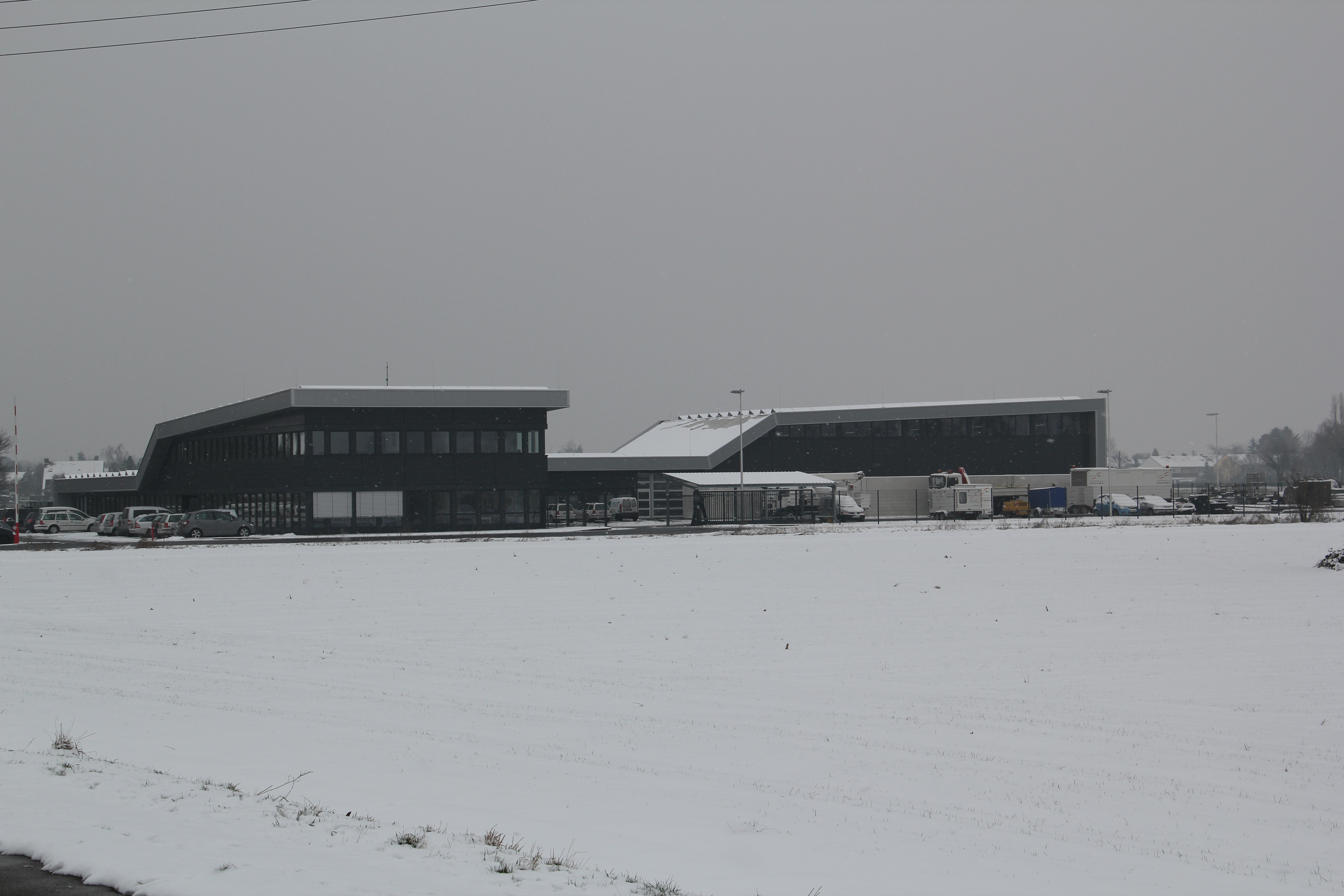 Hauptsitz der Wirtschaftsbetriebe Meerbusch (wbm) ab 01.02.2016; Stadtwerke Meerbusch